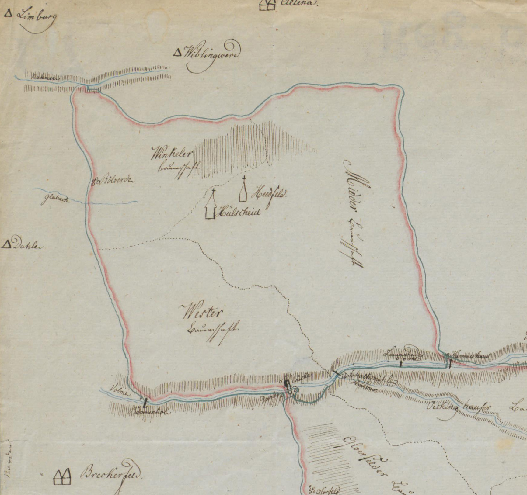 Kirchspiel Hülscheid der Municipalität Halver. Kartografiert um 1810.